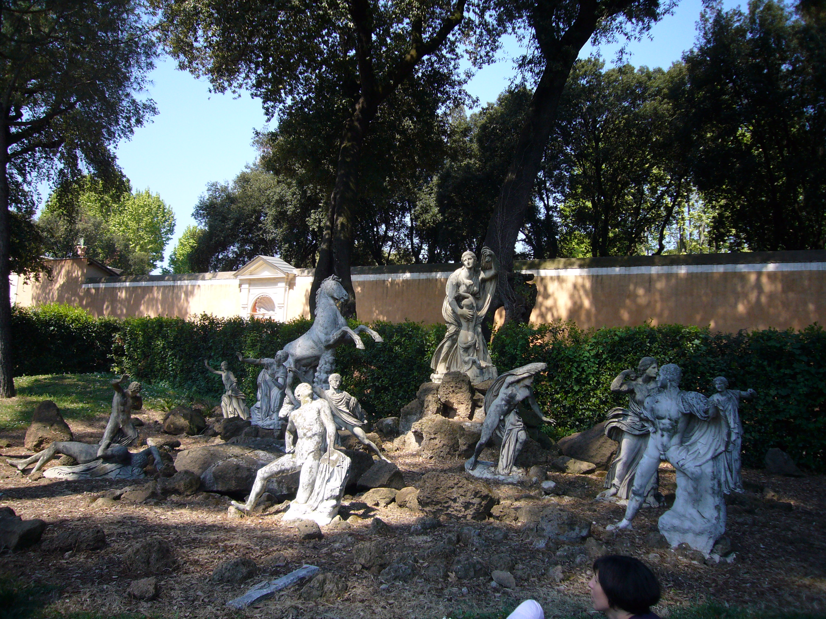 Roma, Villa Medici, gruppo dei Niobidi (copie. Il gruppo originale fu trasferito a Firenze nel 1770, ed è agli Uffizi dal 1781)